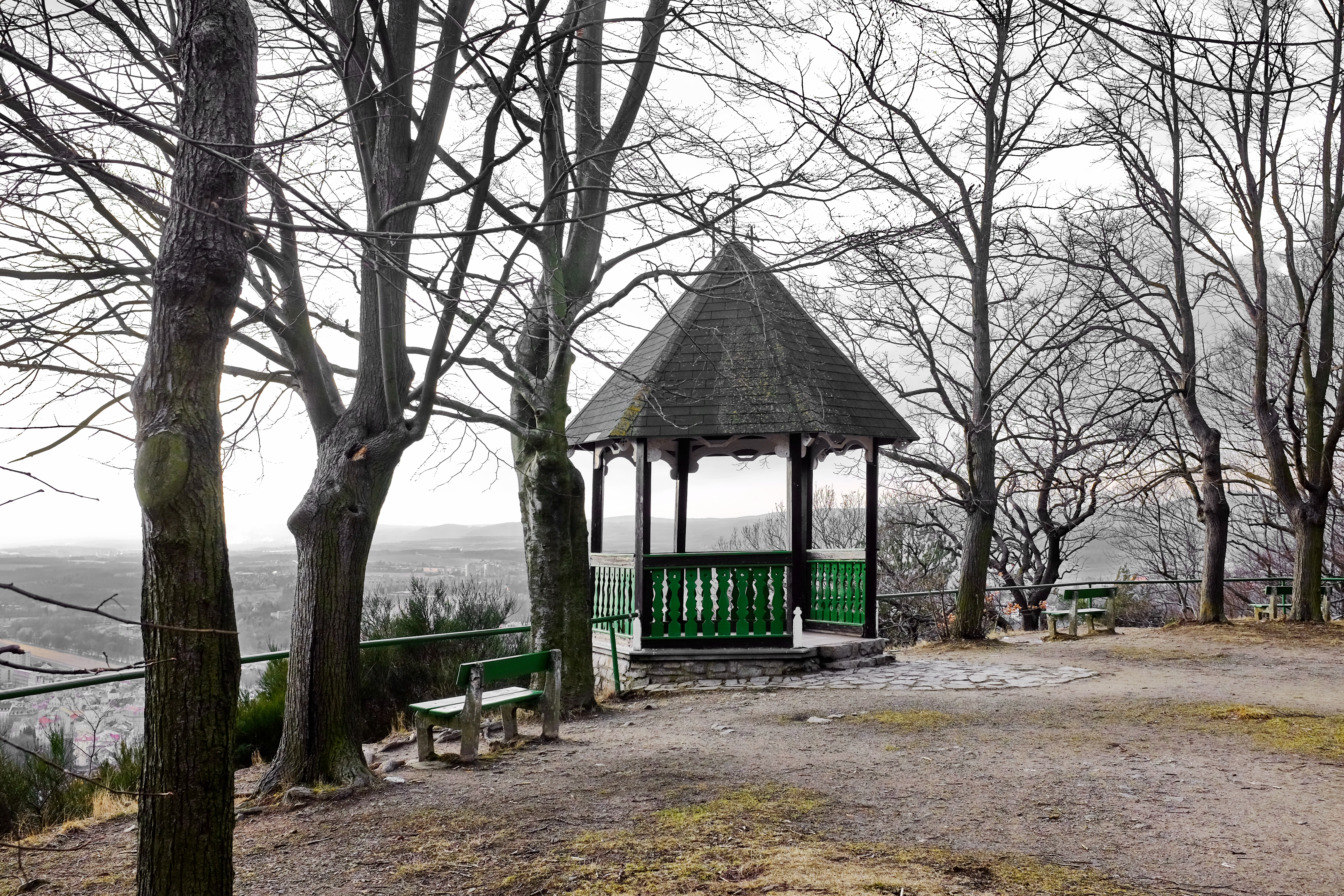 Karlovy Vary, Tři kříže, vyhlídkový altán Camera obscura